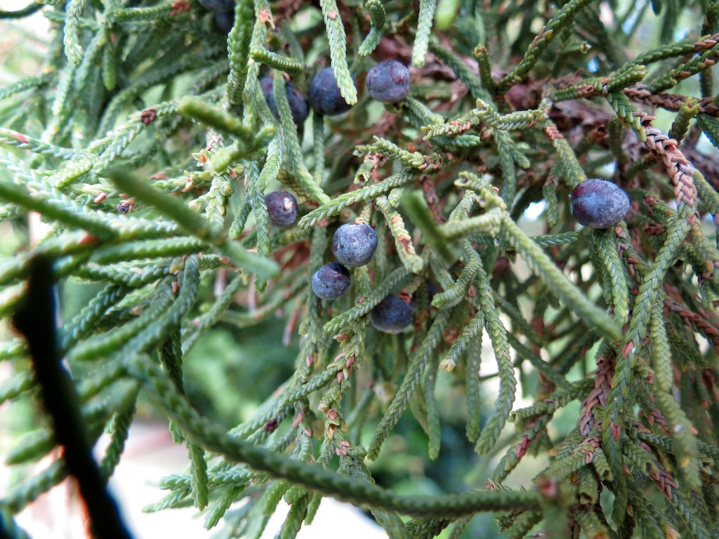 Bermuda Juniper Juniperus bermudiana